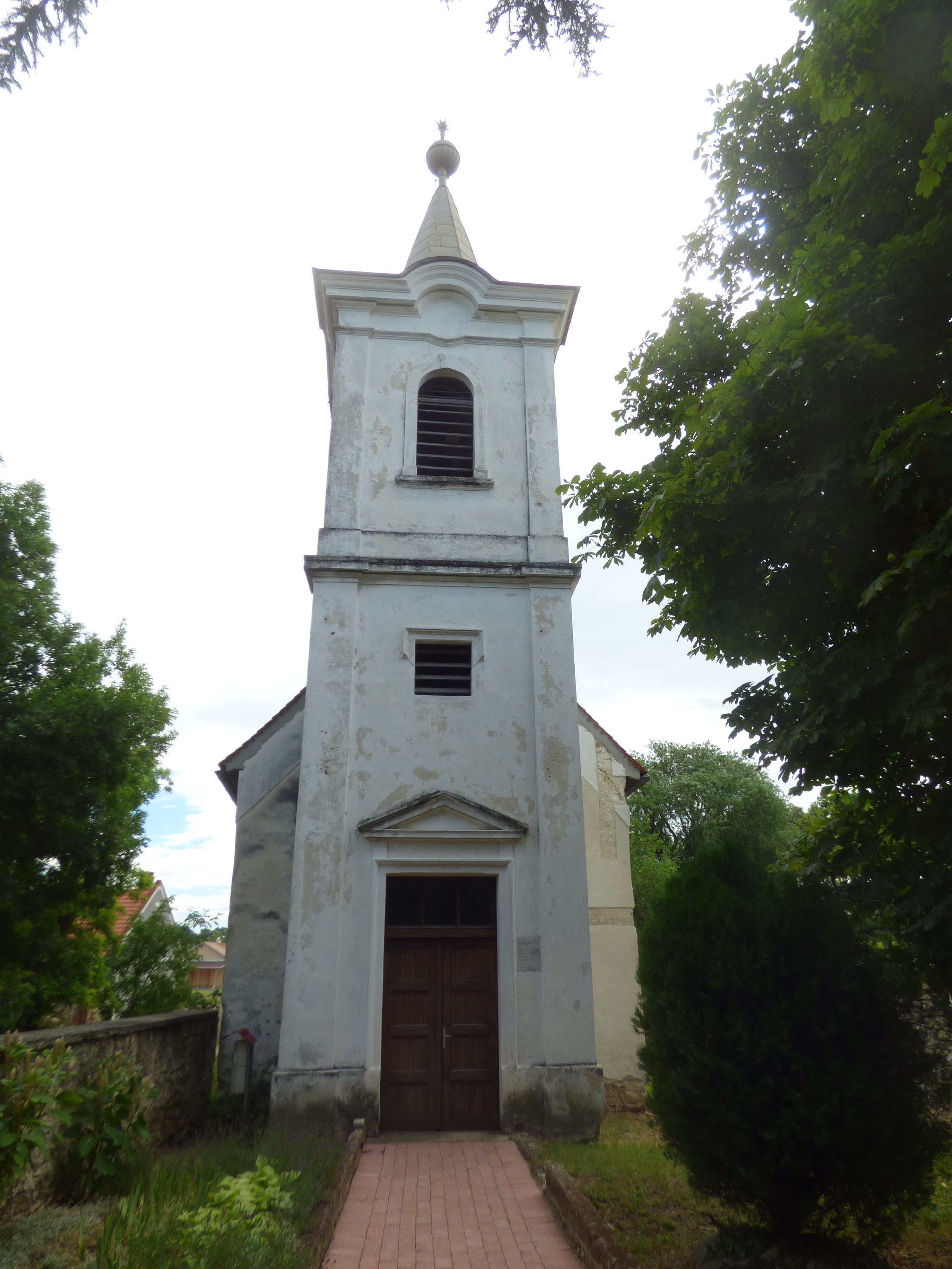 Sóly, a református templom homlokzata